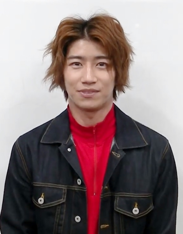 納谷健（俳優） 『沼落ち5秒前! -俳優編第35回-』0:01辺りのスクリーンショット This video, screenshot or audio excerpt was originally uploaded on YouTube under a CC license. Their website states: "YouTube allows users to mark their videos with a Creative Commons CC BY license." To the uploader: You must provide a link (URL) to the original file and the authorship information if available.